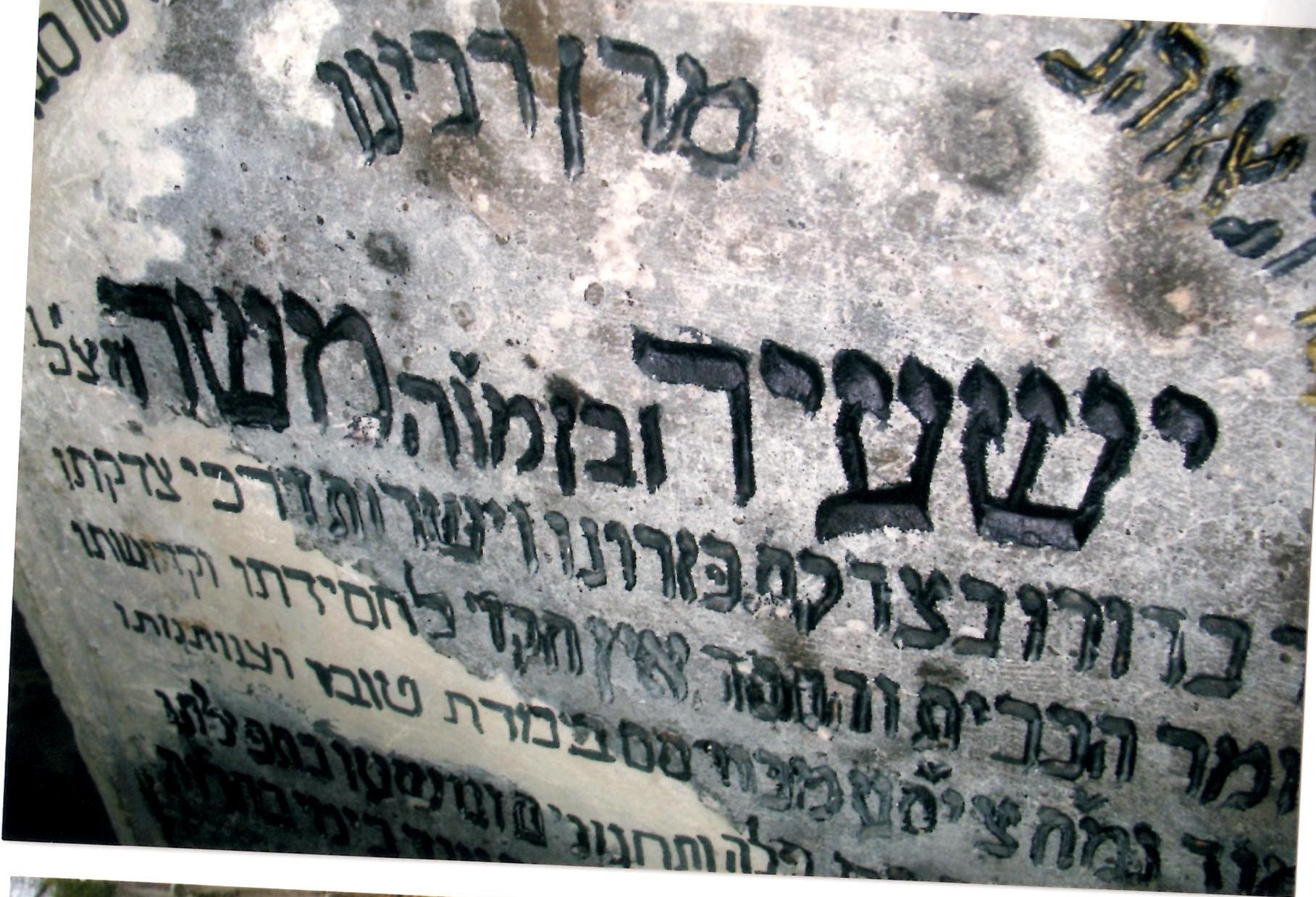 ציונו של רבי ישעיה קסטירר